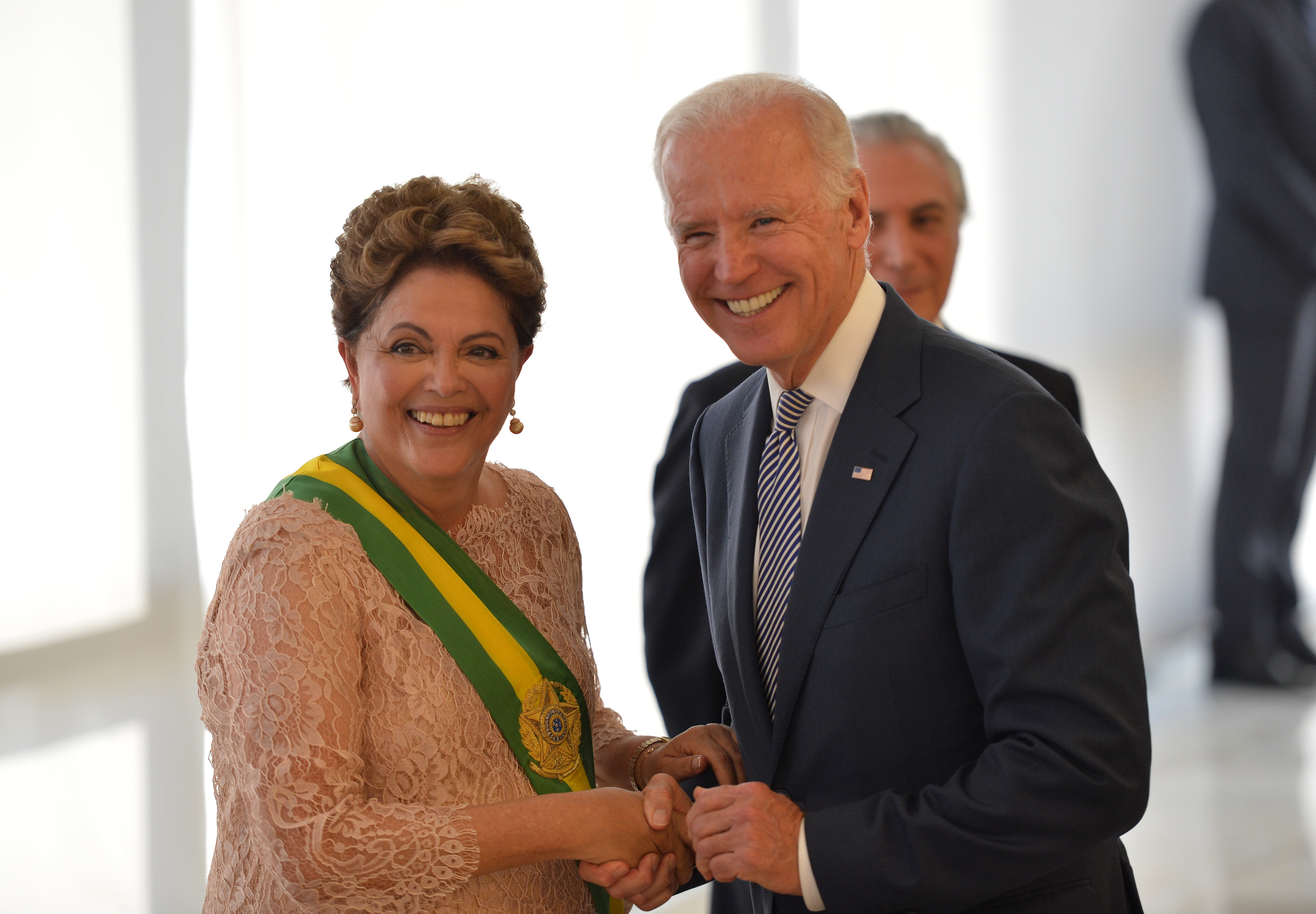 A presidenta Dilma Rousseff recebe cumprimento do vice-presidente dos Estados Unidos, Joe Biden, durante cerimônia de posse no Palácio do Planalto (Wilson Dias/Agência Brasil).